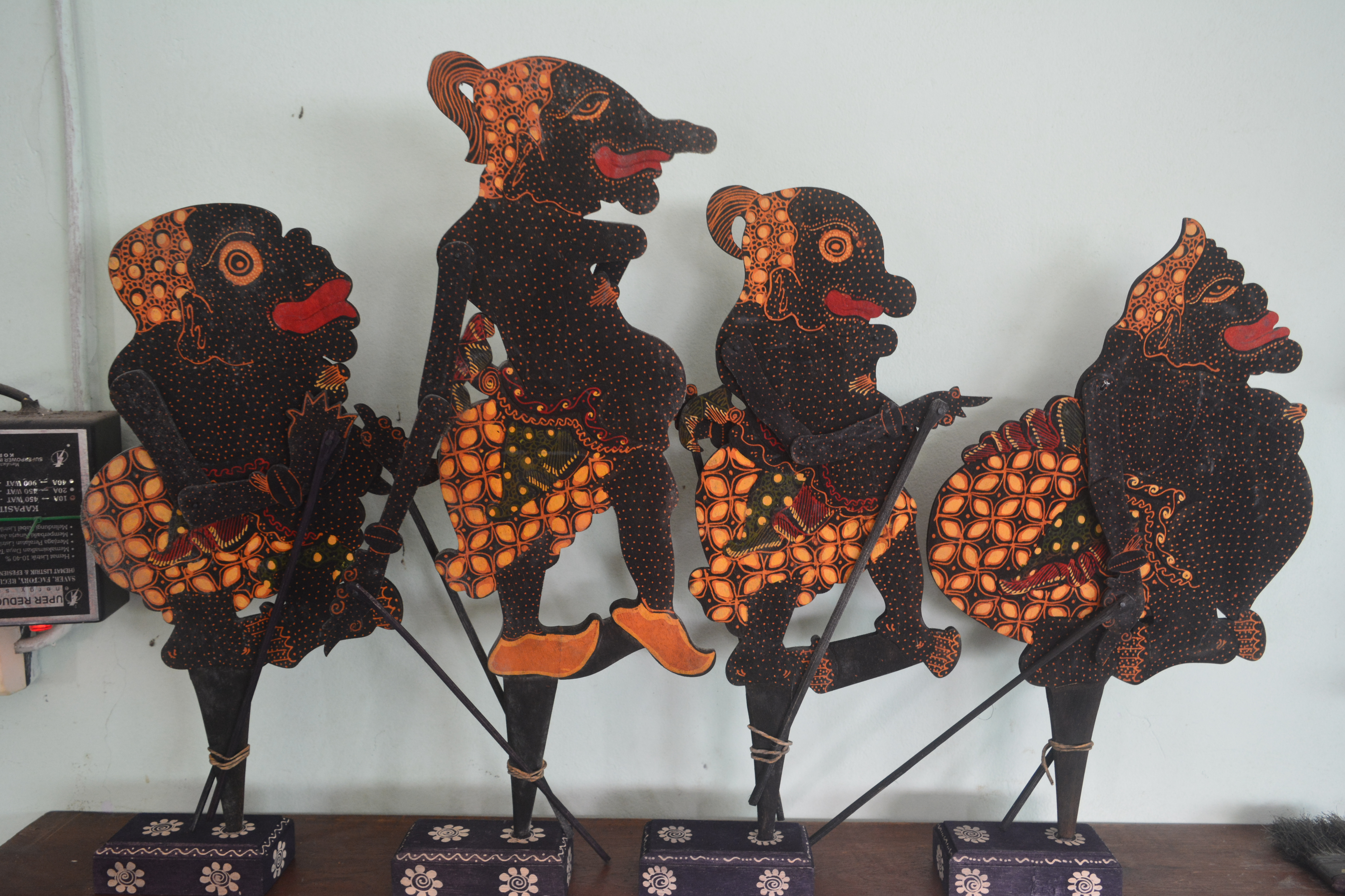 Wayang Klithik merupakan wayang yang dibuat dari kayu. Wayang pada gambar ini merupakan tokoh dalam pewayangan Mahabaratha yaitu Punakawan